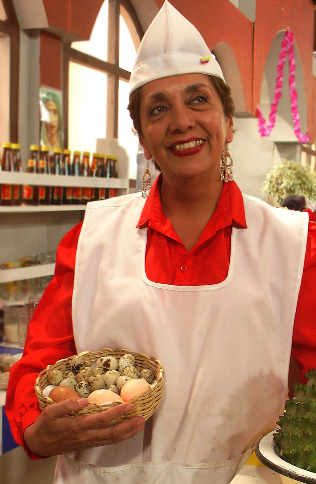 Martha de Salas as "Meche" , in the tv show "Las Zuquillo"